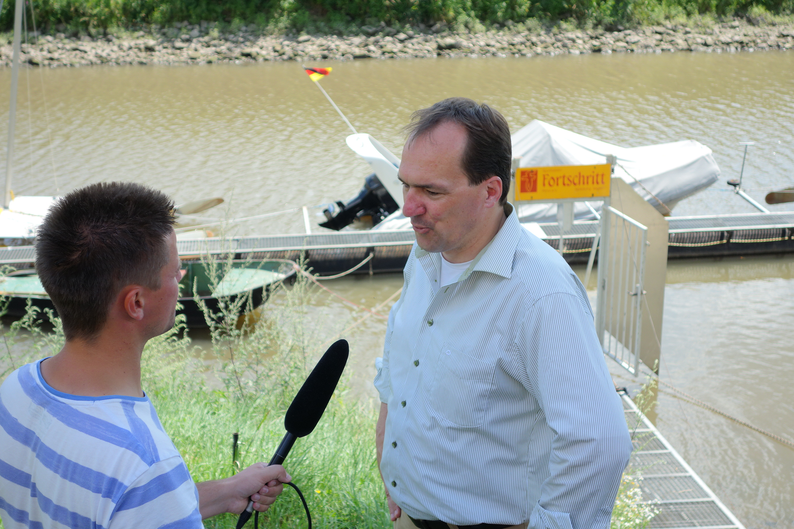 Roland Werner, damaliger Staatssekretär für Verkehr im Sächsischen Staatsministerium für Wirtschaft, Arbeit und Verkehr, am 22. Juli 2014 zu einem Gespräch mit Vertretern des Seglerverbandes Sachsen e.V. über Wasserwanderinfrastruktur und sein Aktionsprogramm Sportschifffahrt sowie mit Medienvertretern im Hafen Pirna.